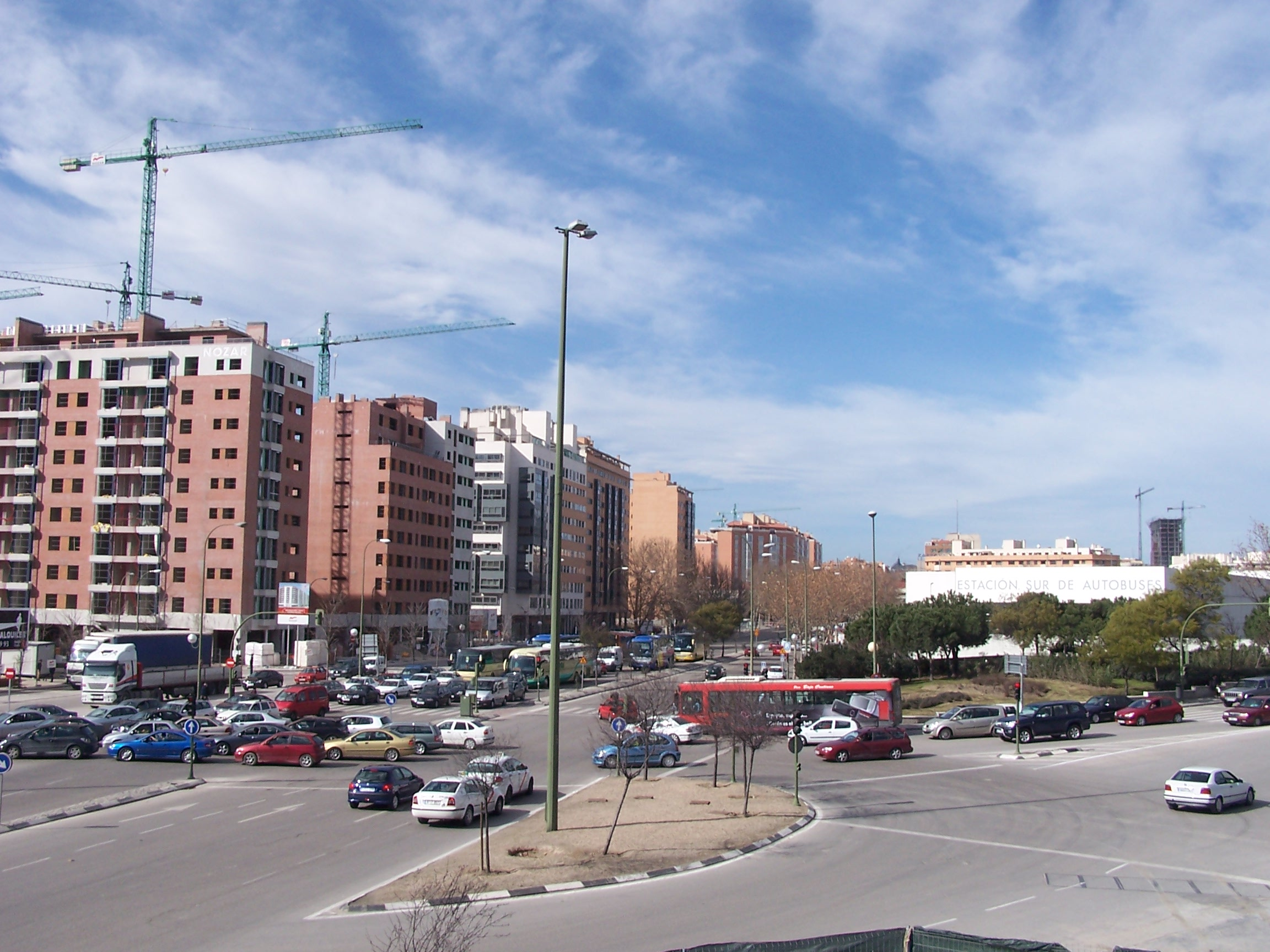 Mendez Alvaro